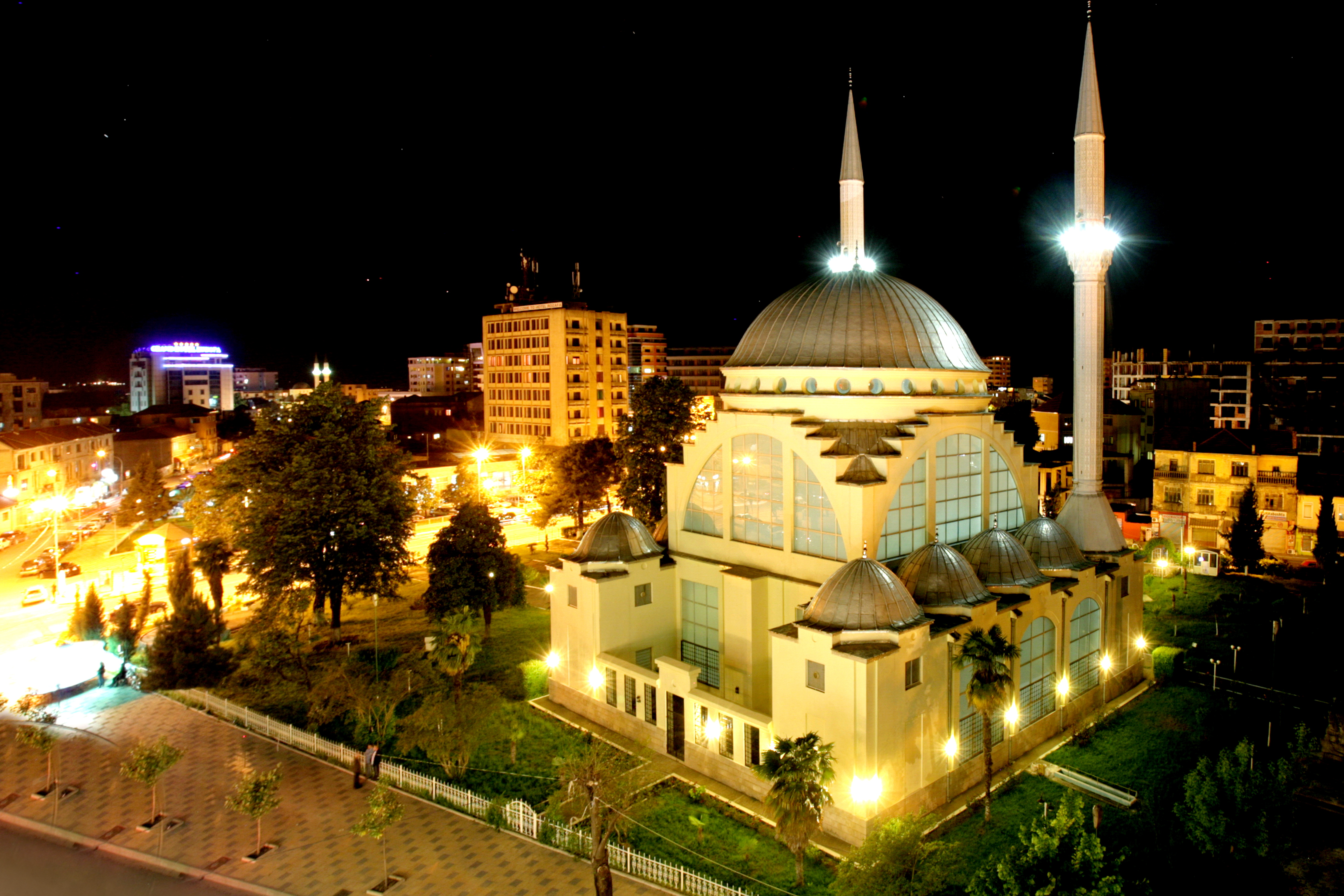 Xhami në Shkodër